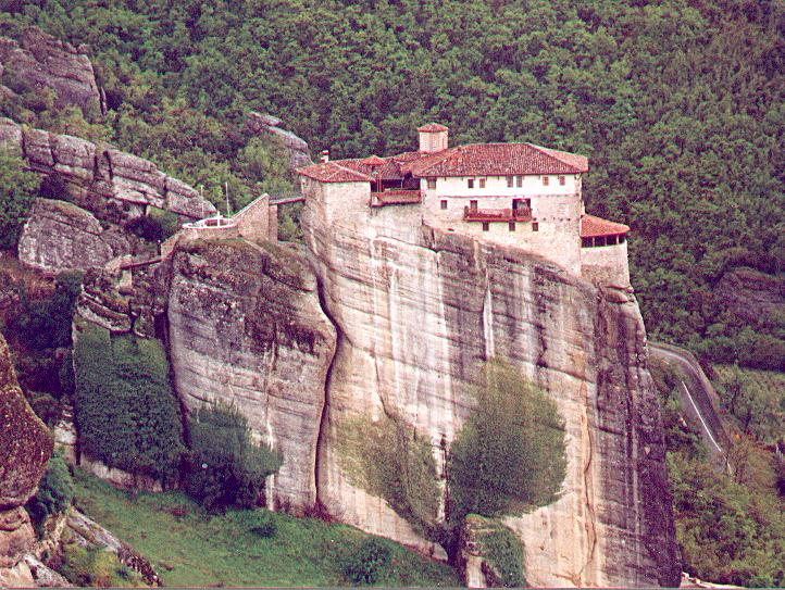 eigen fotos